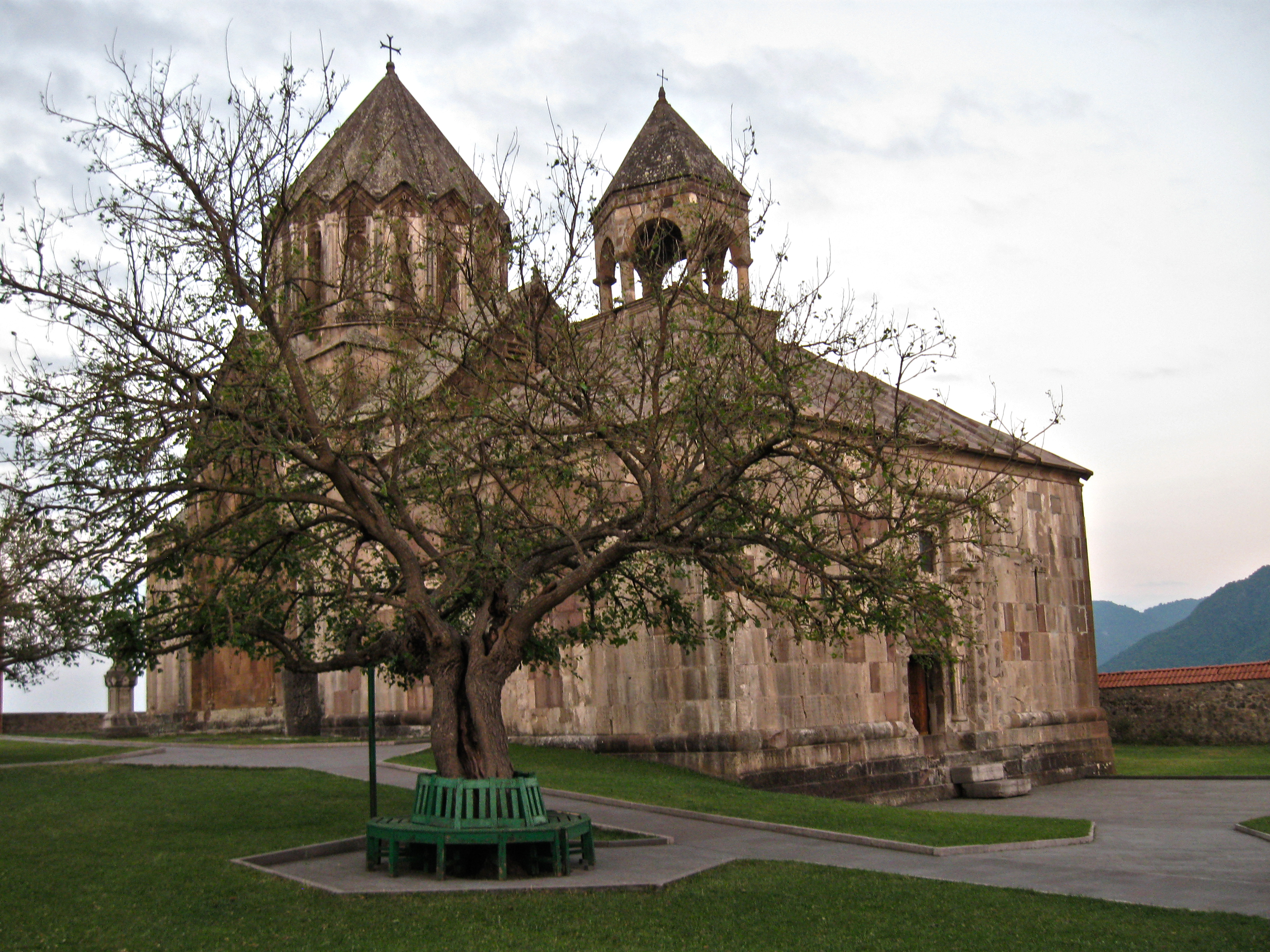 համալիր Գանձասար